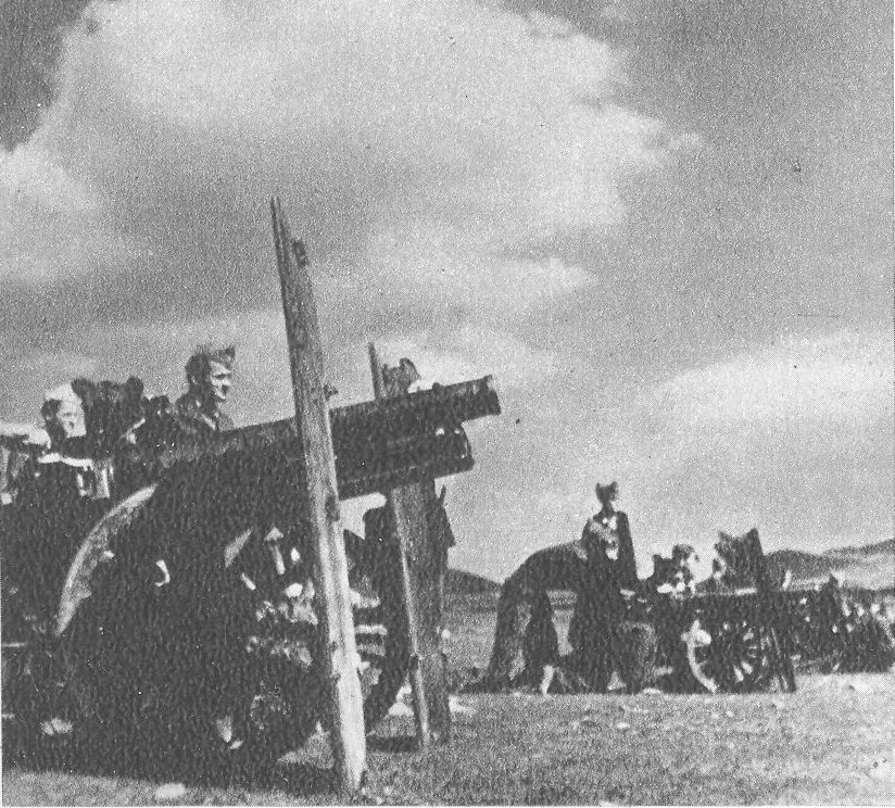 Srpskohrvatski / српскохрватски: U Donjem Lapcu (Lika), juna 1942, prva partizanska artiljerija u Hrvatskoj dejstvuje na neprijatelja. Topovi su zaplenjeni od Italijana.